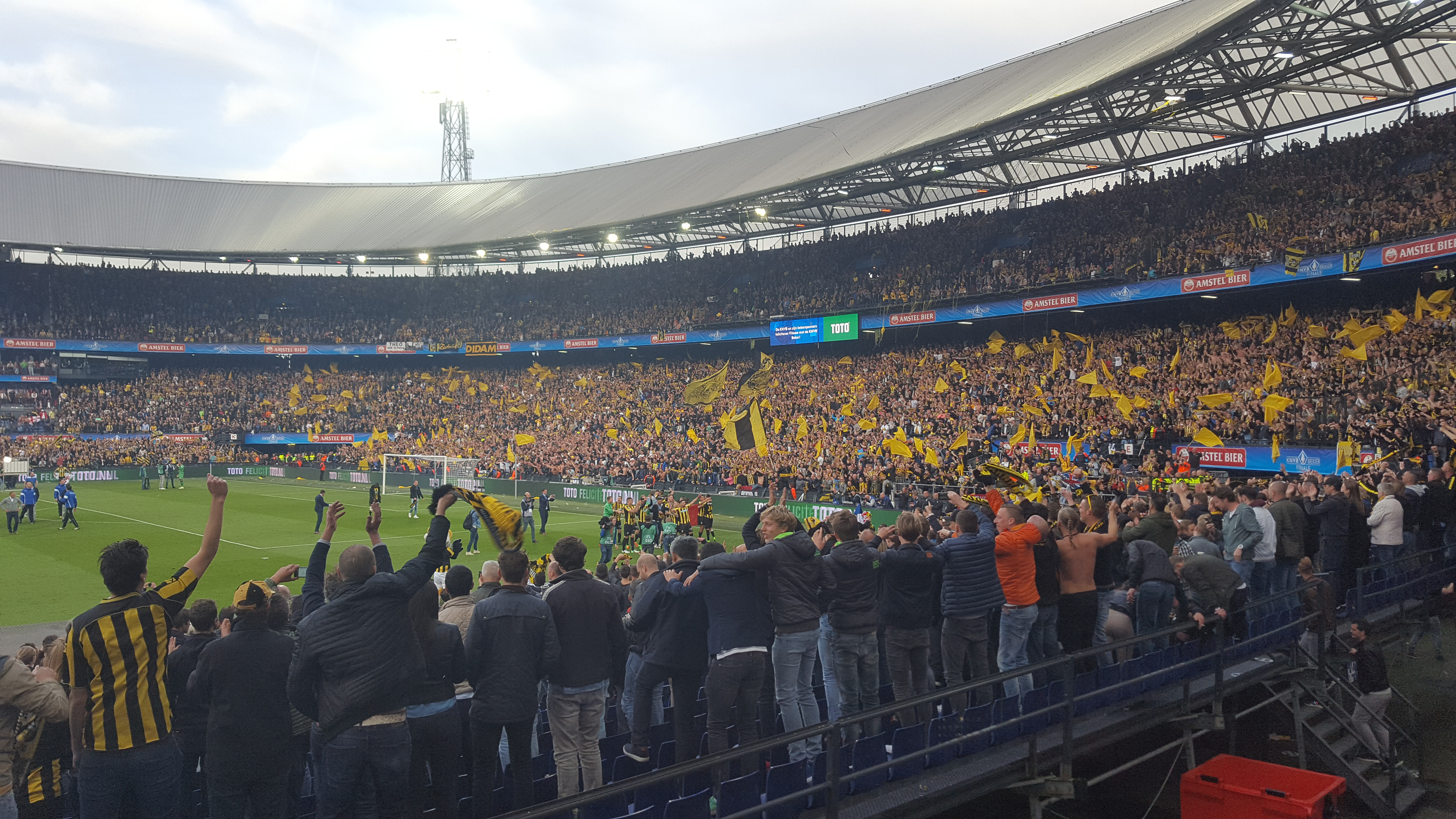 Bekerfinale2017